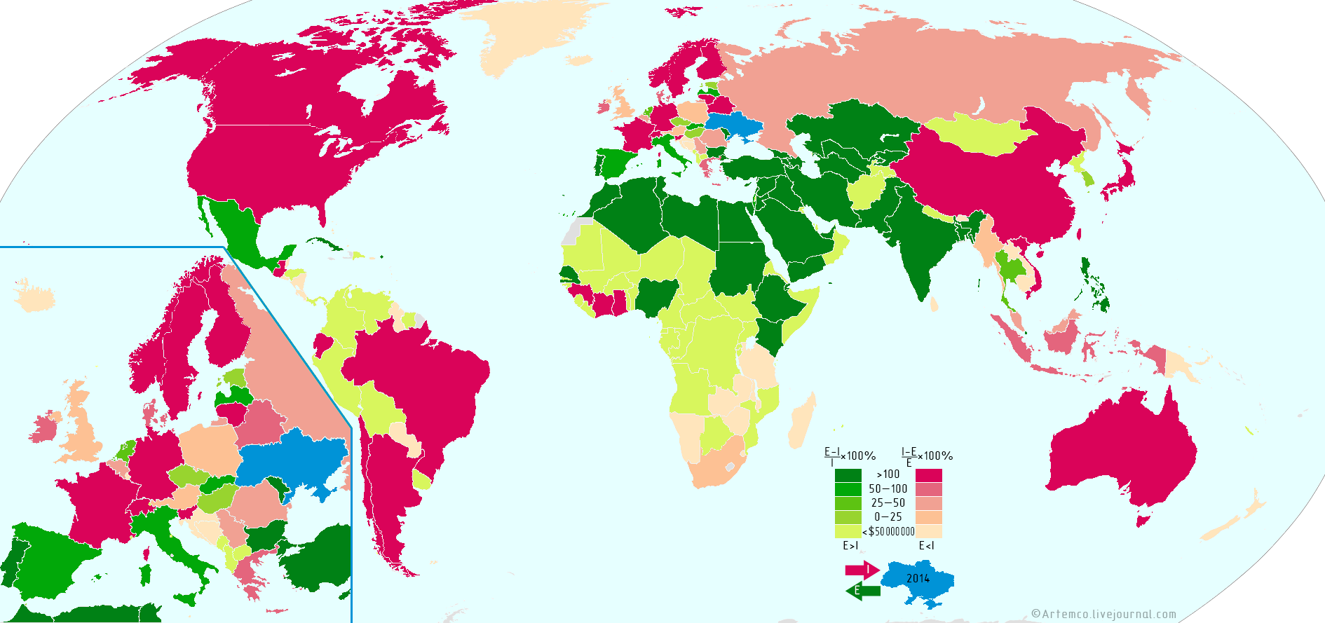 разница между экспортом и импортом по странам в процентах